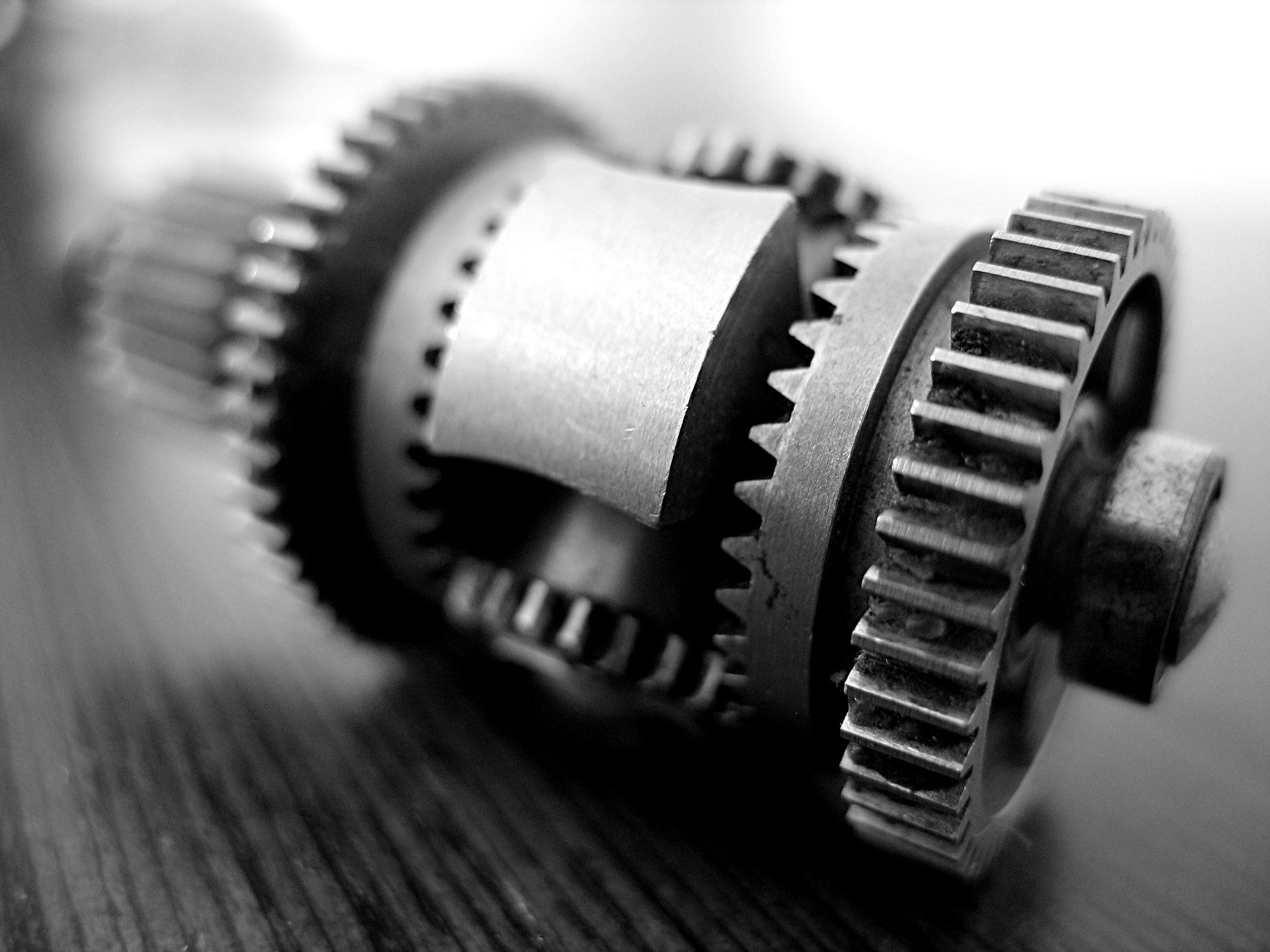 hammasrattad